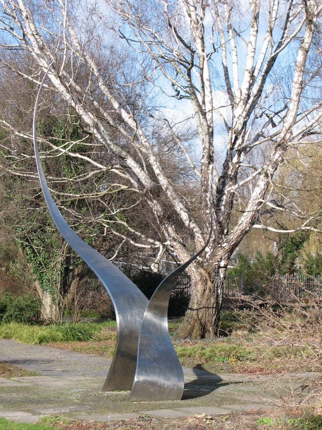 Hommage an Karl Foerster by (1974) in Potsdam/Germany